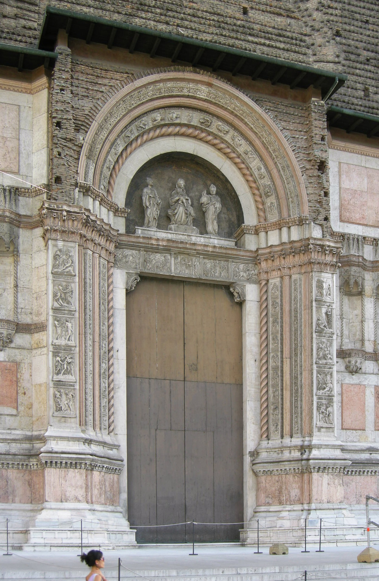 San petronio, portale maggiore